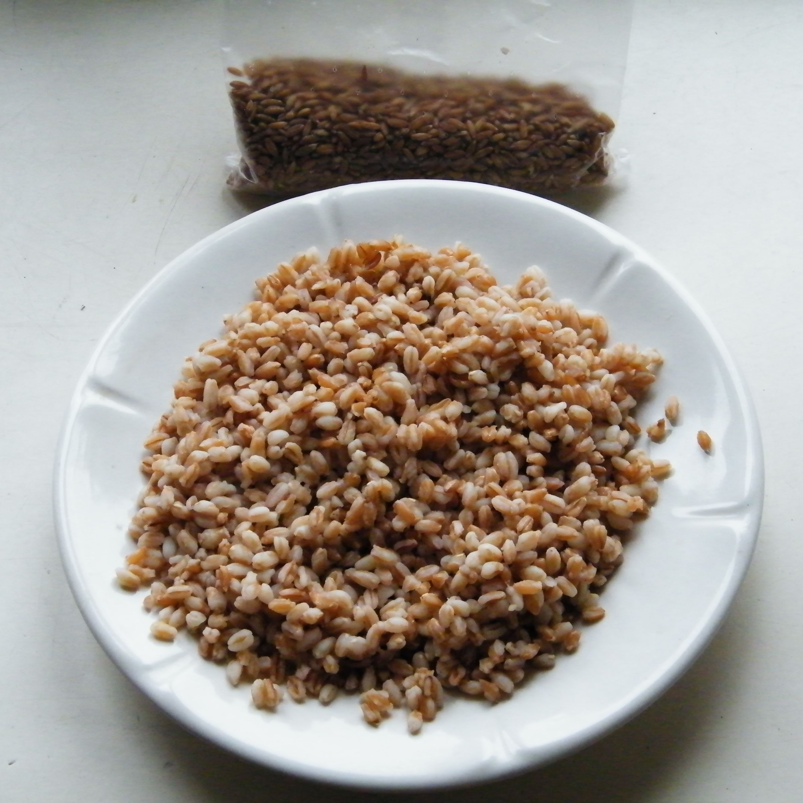 Каша из полбы и крупа в пакетике